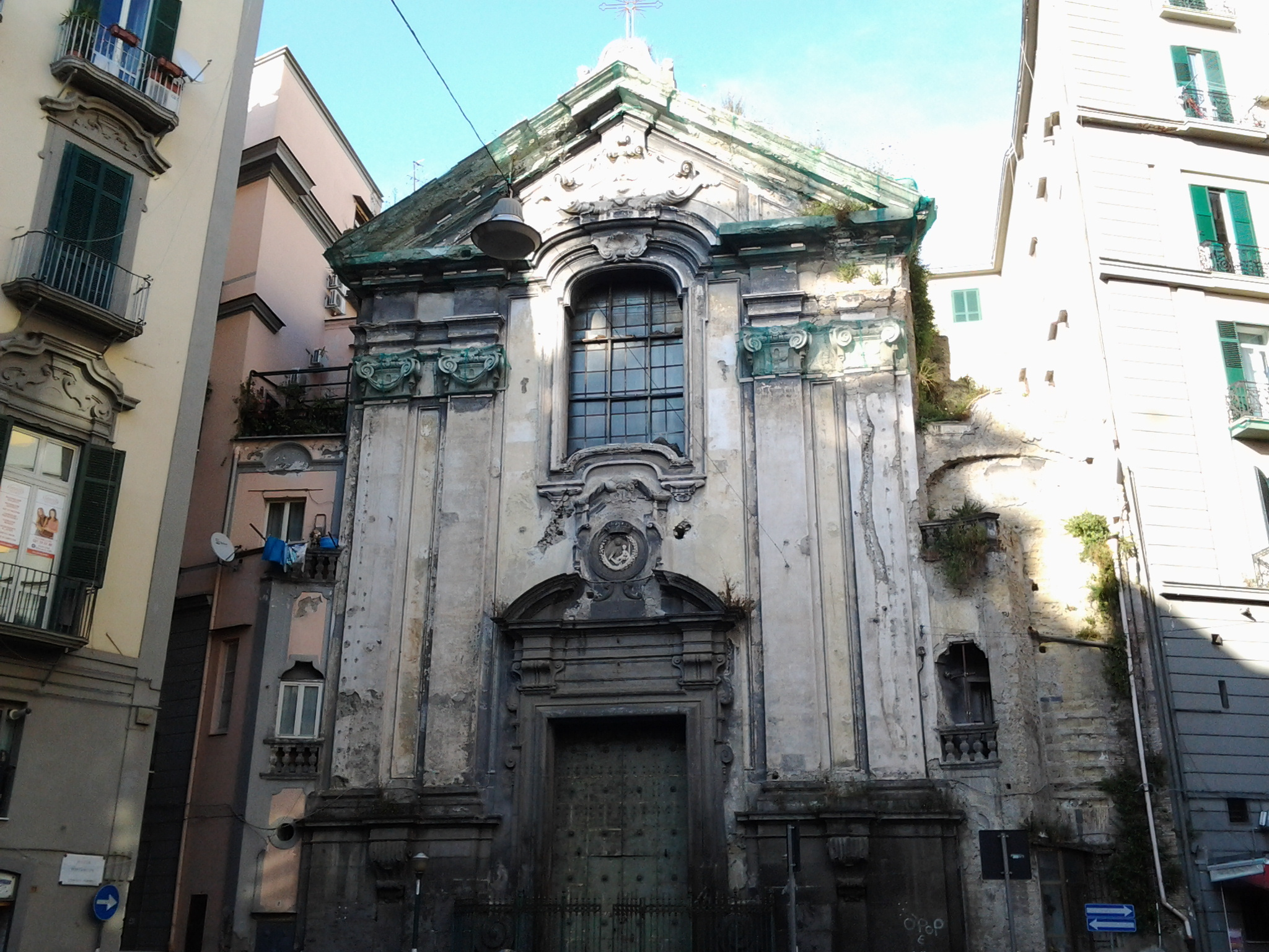 Facciata, Santa Maria di Portanova, Napoli